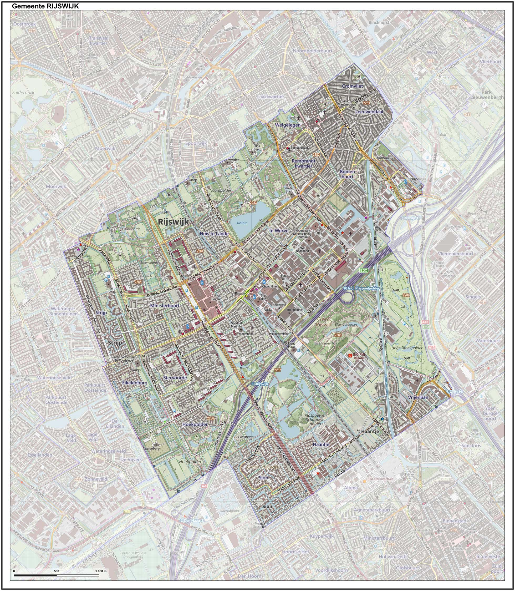 Topografische gemeentekaart. Resolutie: 400 pixels/km. Kaartbeeld samengesteld uit de open geodata van de Top10NL en Top25namen (Kadaster), Creative Commons-BY licentie. Gebouwvlakken uit open geodata BAG extract. Wegen uit de OpenStreetMap, OpenStreetMap community. Reliëfschaduw uit de Actuele Hoogtekaart AHN2. Samenstelling en kleurenschema: Jan-Willem van Aalst, met QGIS. Zie ook de Legenda.